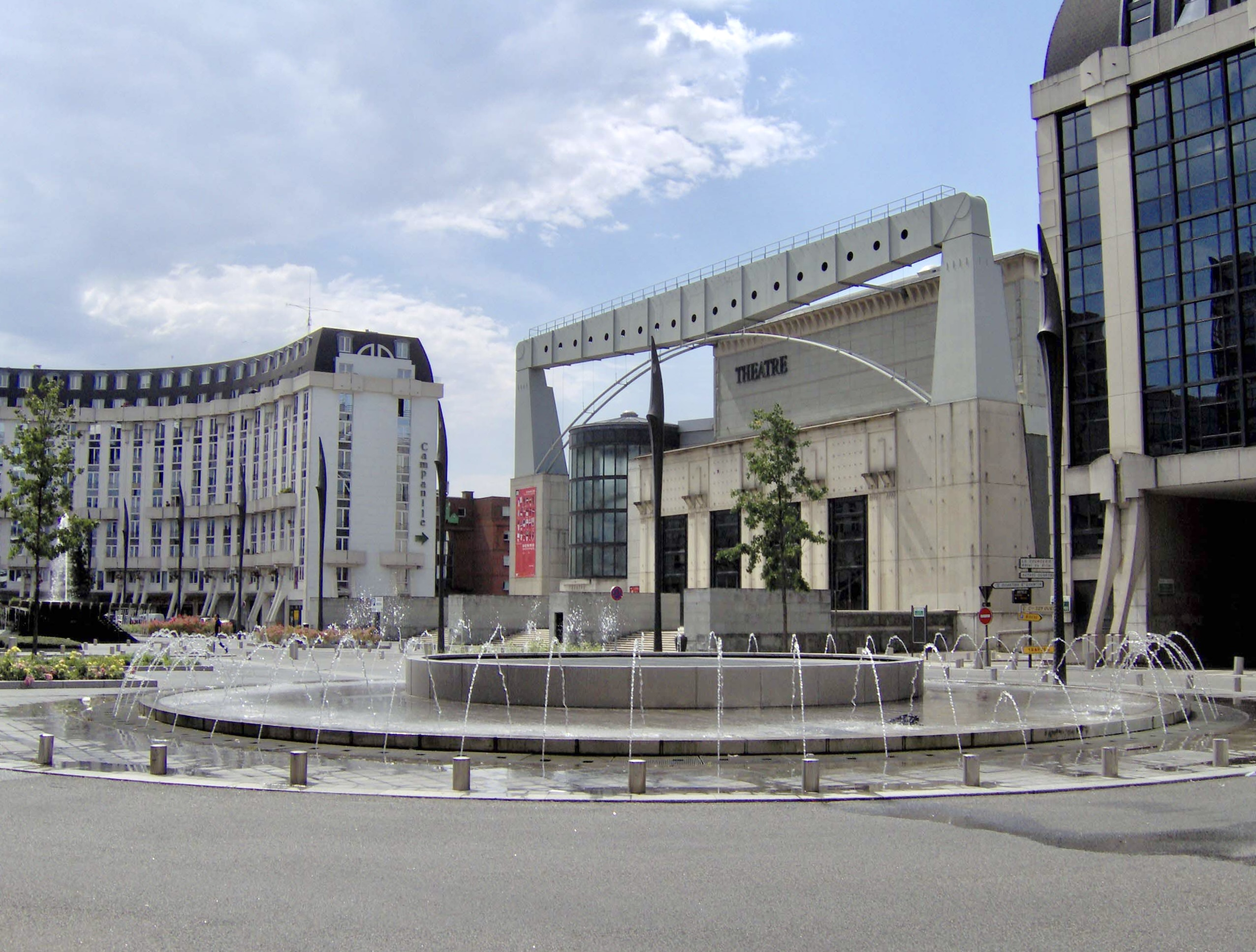 Placo Pompidou kaj teatrejo de Saint-Quentin-en-Yvelines en Montigny-le-Bretonneux.